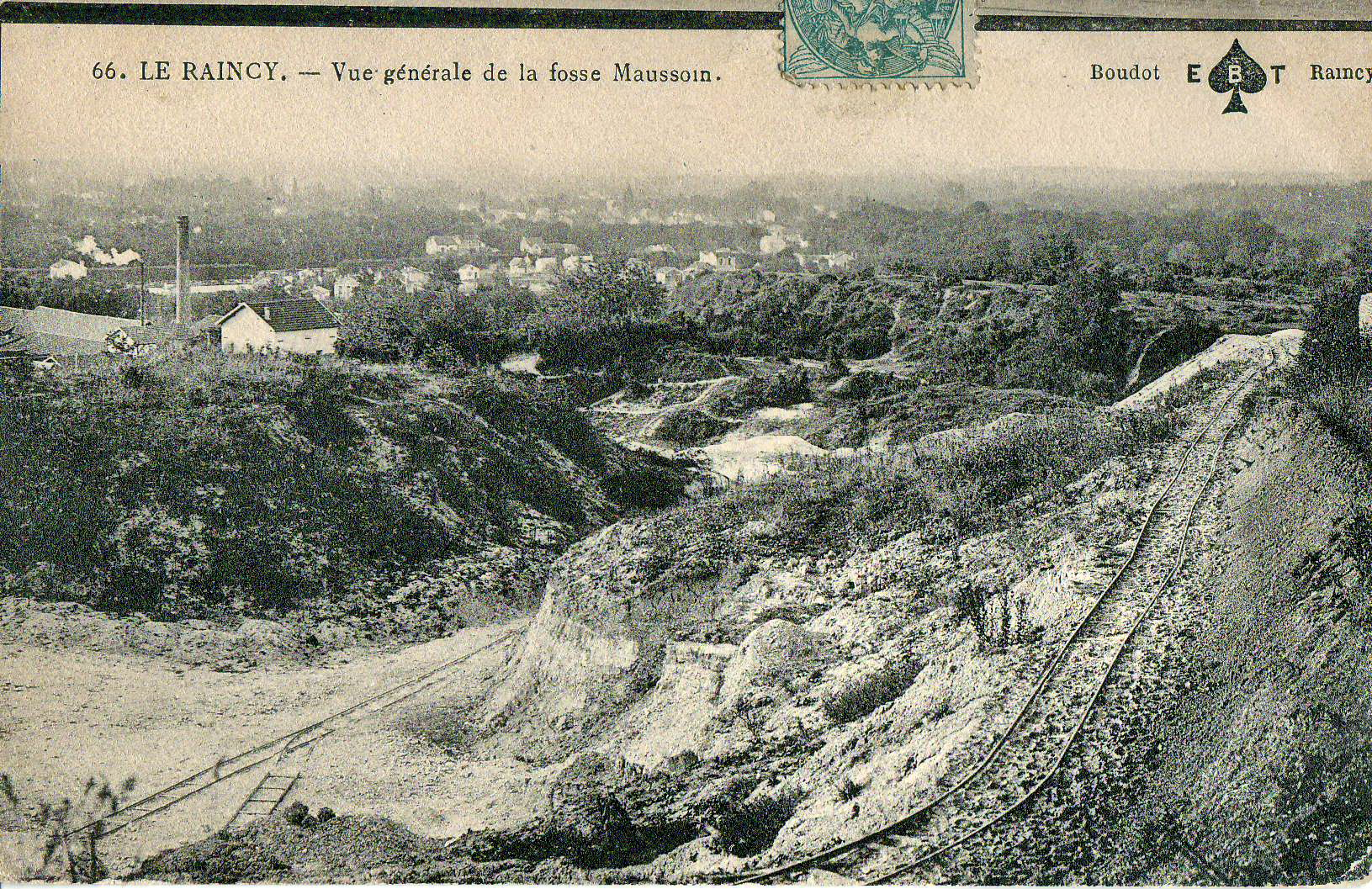 Carte postale ancienne éditée par Boudot au Raincy - EBT, N°66LE RAINCY : Vue générale de la Fosse MaussoinEn fait, la carrière de la Fosse-Maussoin est située à Clichy-sous-Bois.Noter le chemin de fer minier type Decauville et sa rampe escarpée